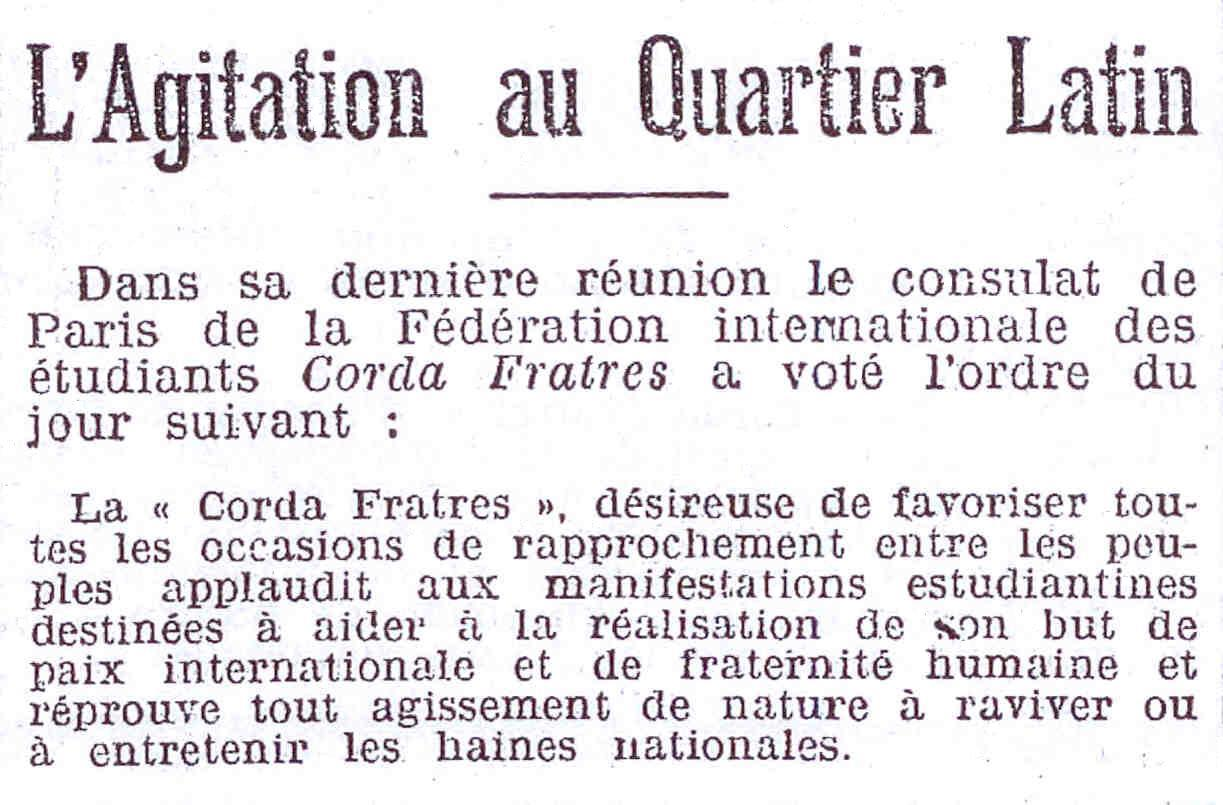 Un article de l'Humanité qui parle de la Corda Fratres.